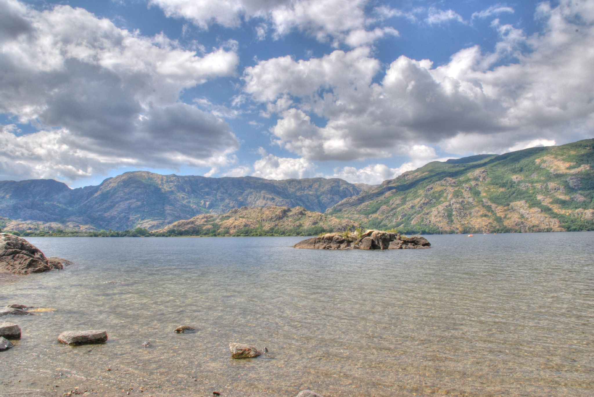 Definitely a must! (better seen in large) Definitivamente un lugar para ir! (mejor ver en grande)